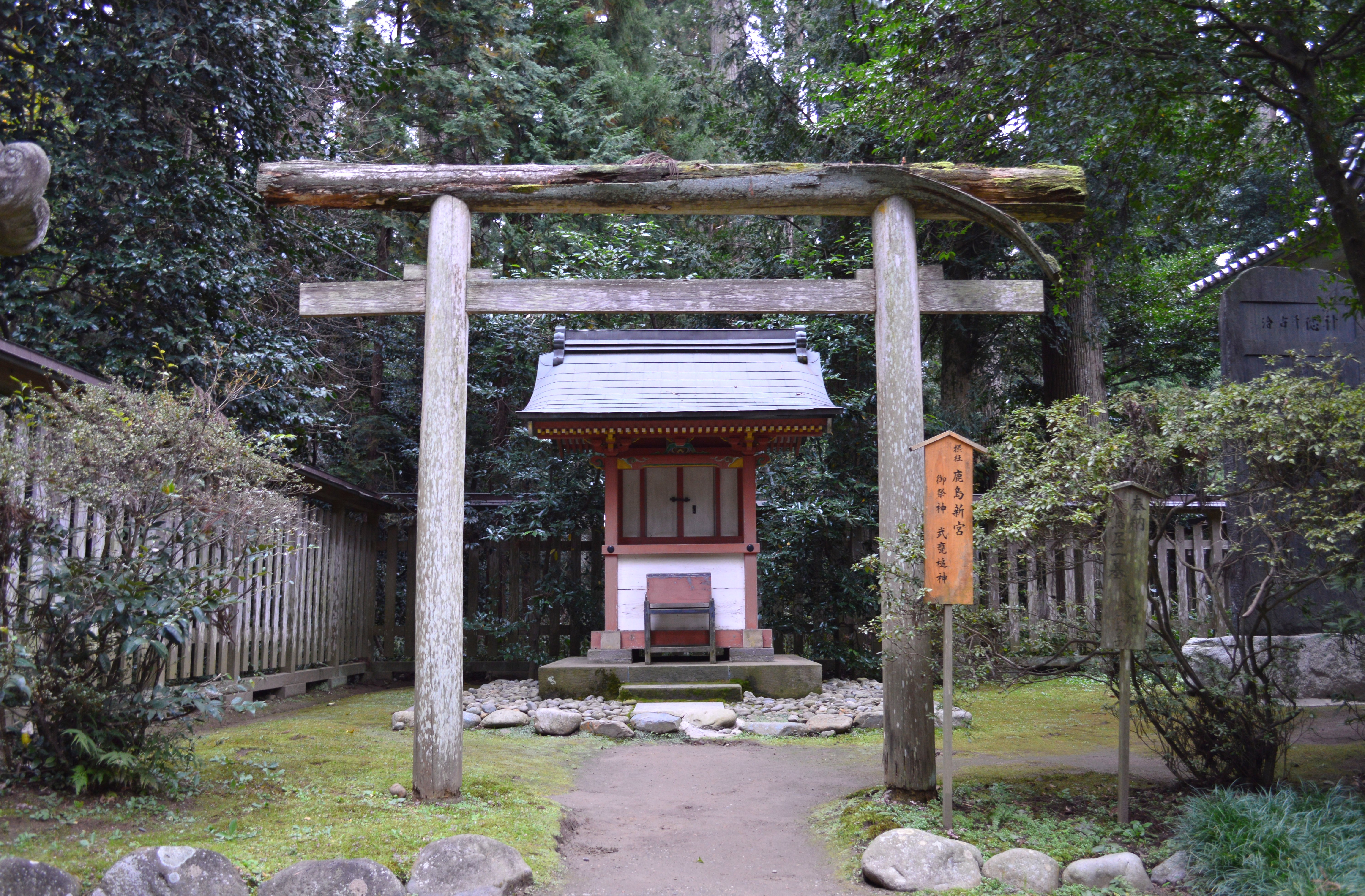 鹿島新宮社 (香取神宮境内社)